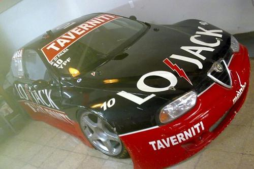 Alfa Romeo 156 de TRV6. Piloto: Mariano Altuna.